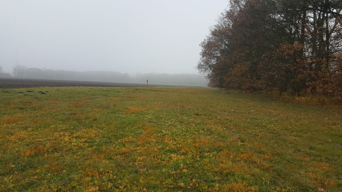 NPP Slatinná louka u Velenky leží vedle zemědělské půdy (2)